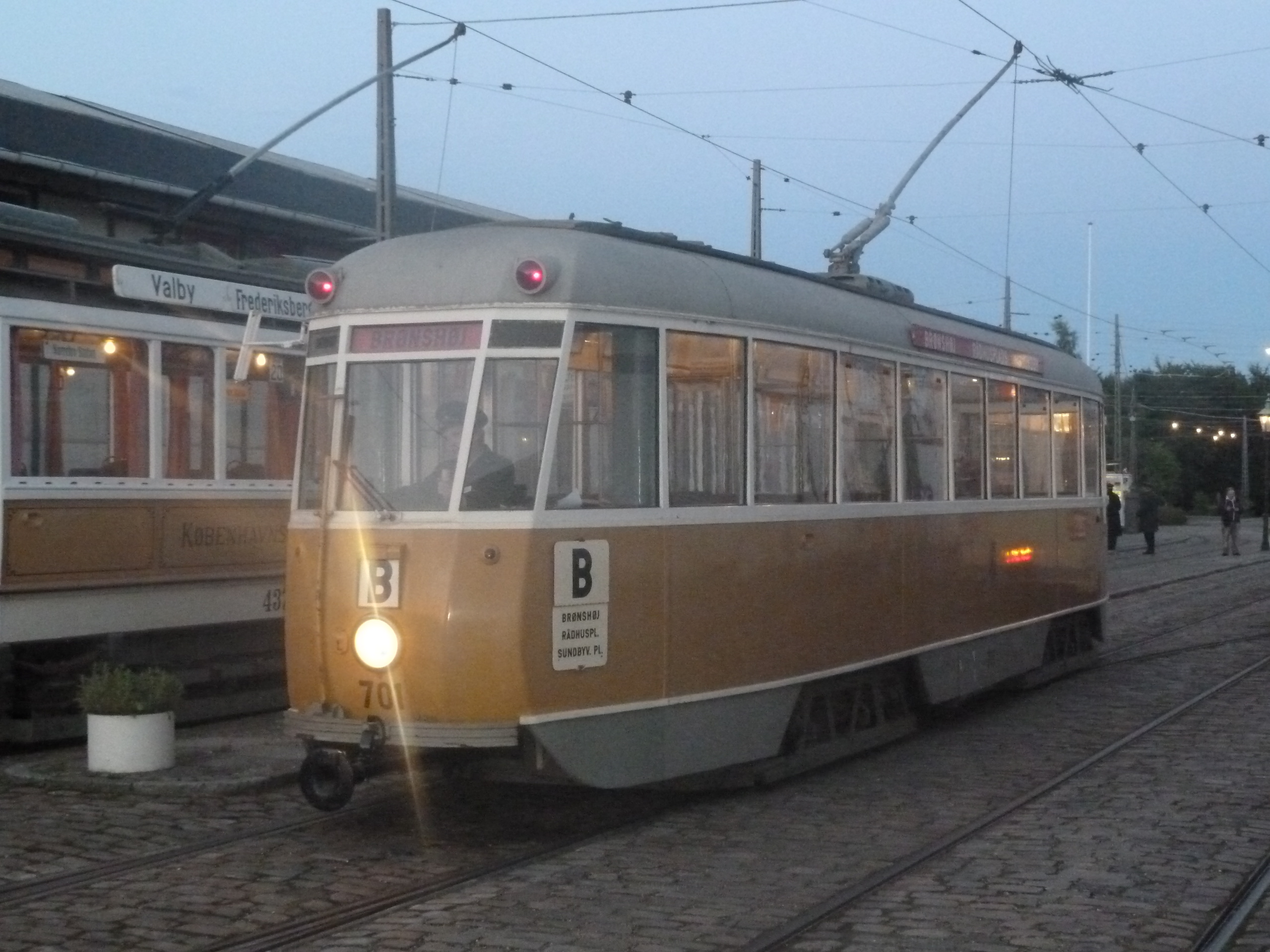 Old tram from Copenhagen, KS 701, as night line B, Sporvejsmuseet Skjoldenæsholm in Denmark.